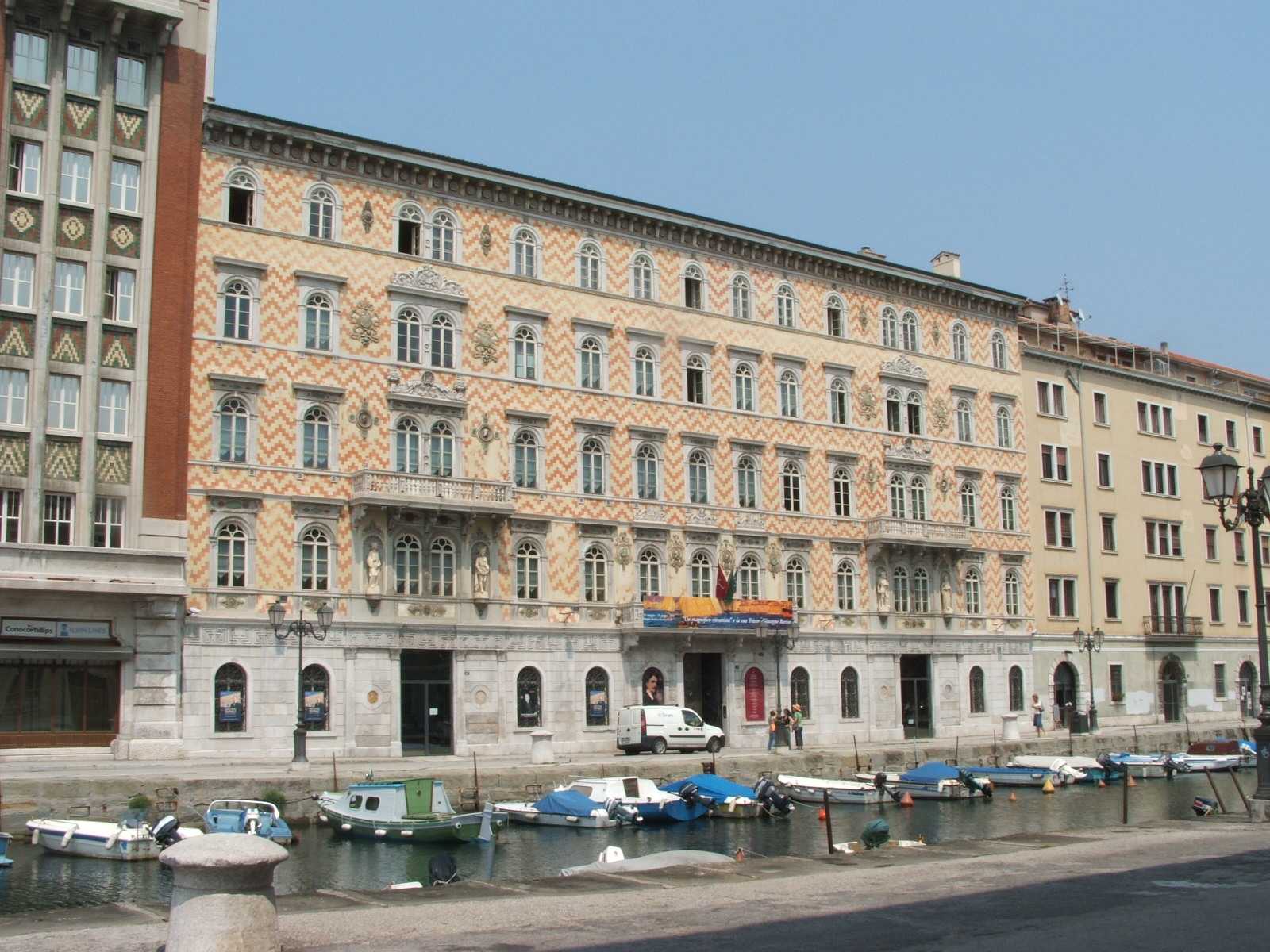 Immagine da Trieste, Friuli-Venezia Giulia, Italia.